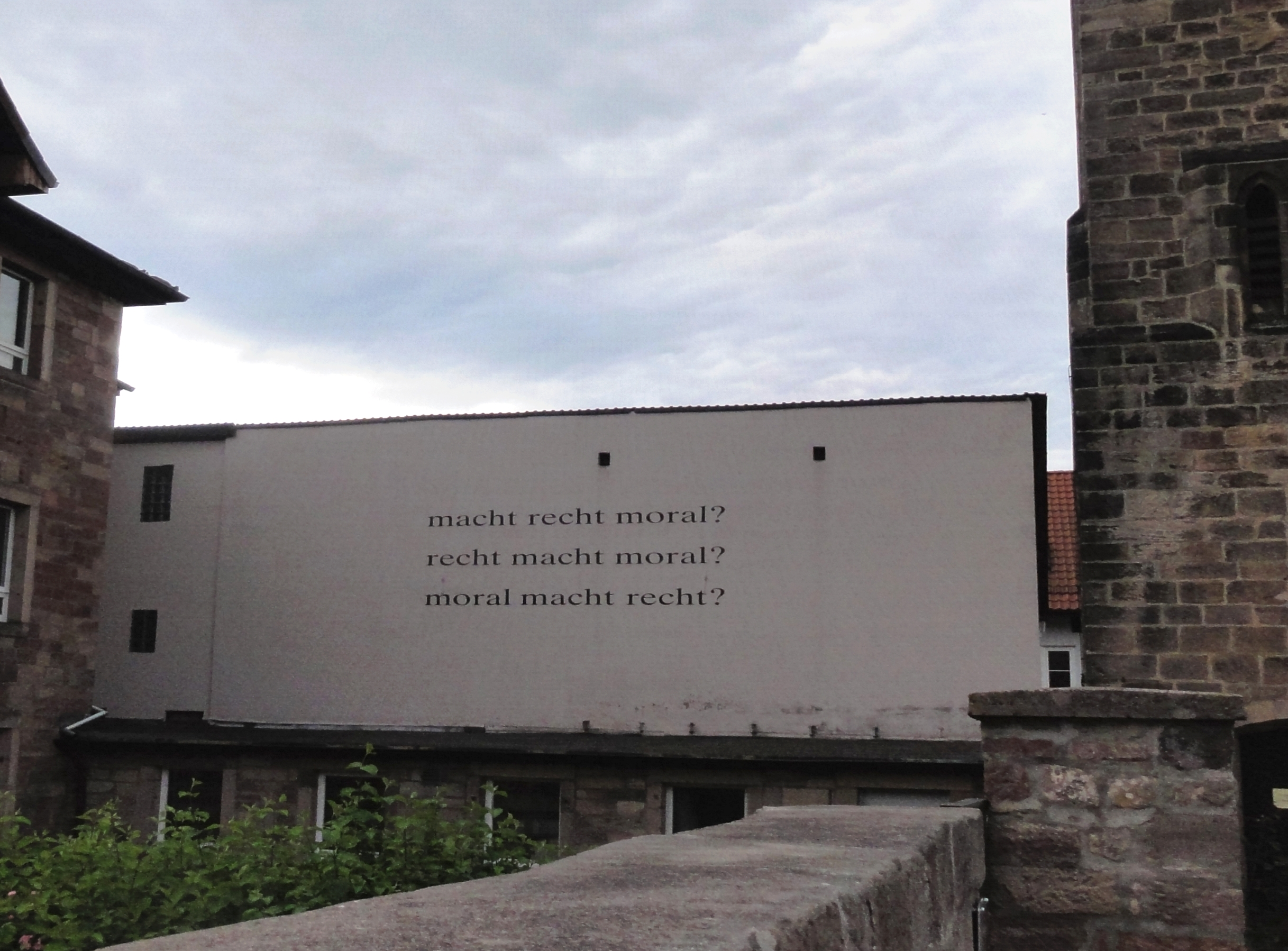 Zwischen dem Hauptgebäude und der Stiftskirche wurden drei Fragesätze des deutschen Philosophen und Kommunikationswissenschaftler Siegfried J. Schmidt auf einer Fassade eingebracht.